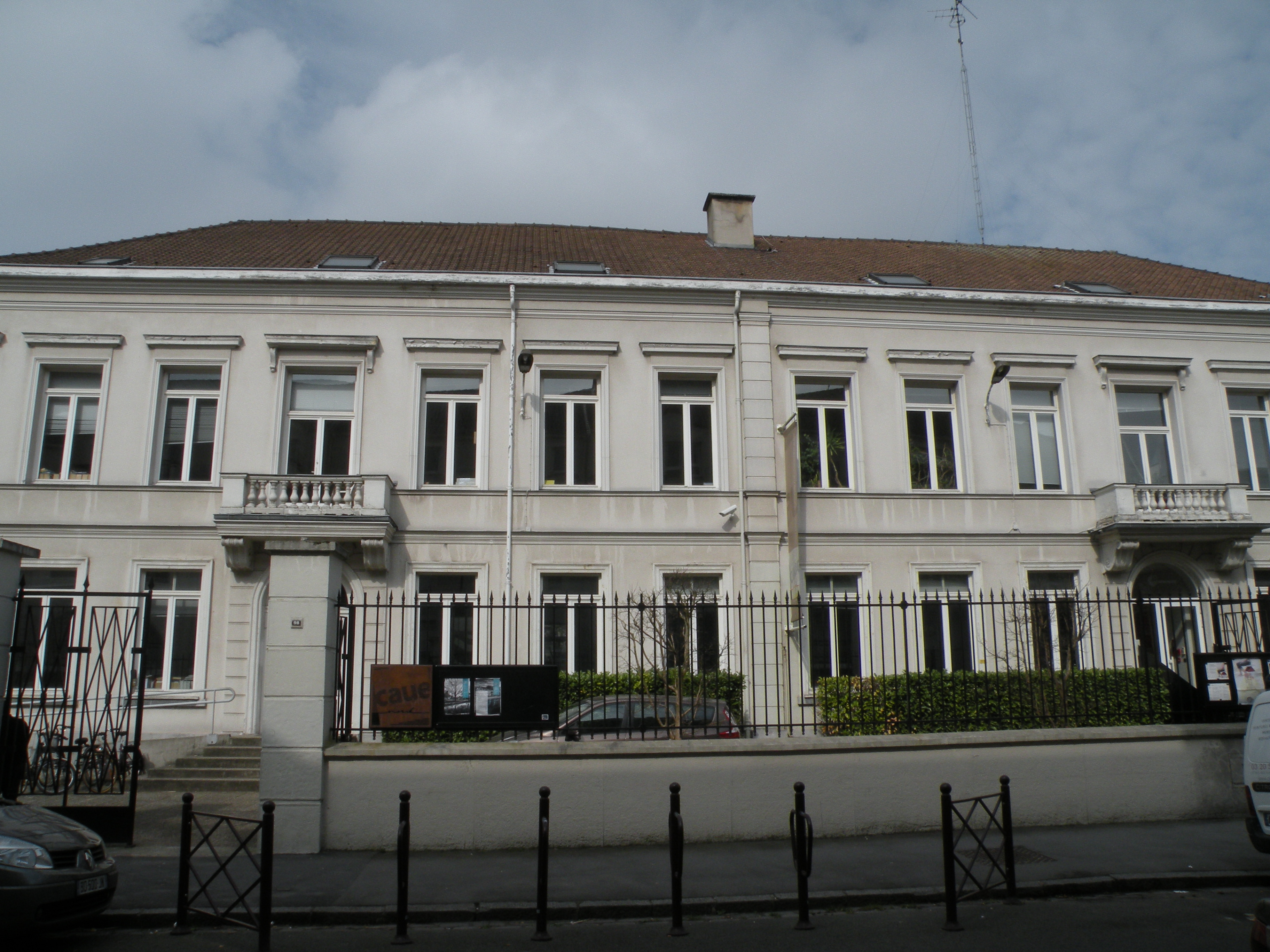 Le CAUE du Nord à Lille.